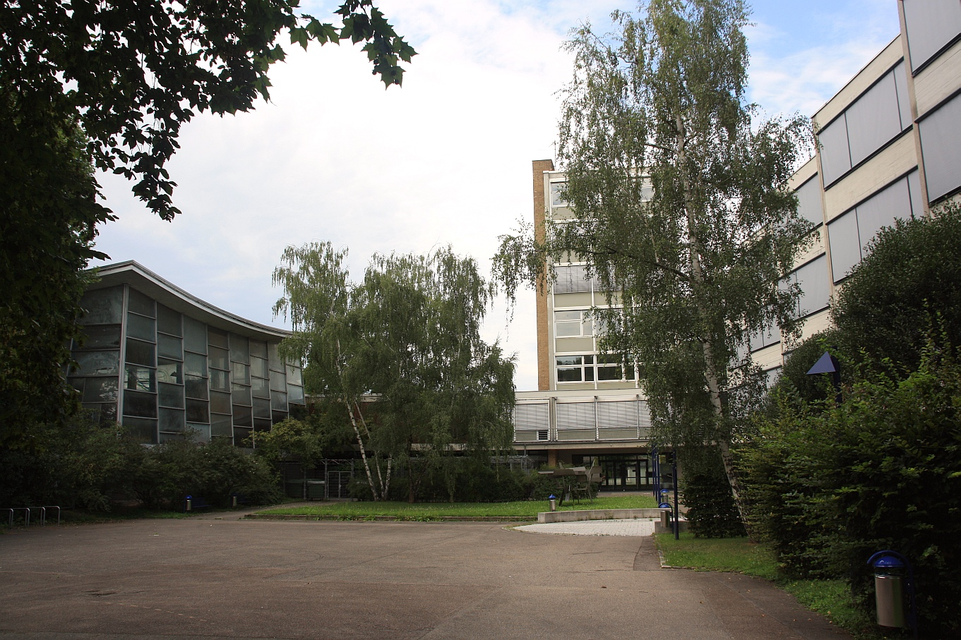 Kaufmännische Schule in Stuttgart-Feuerbach mit angrenzendem Hallenbad